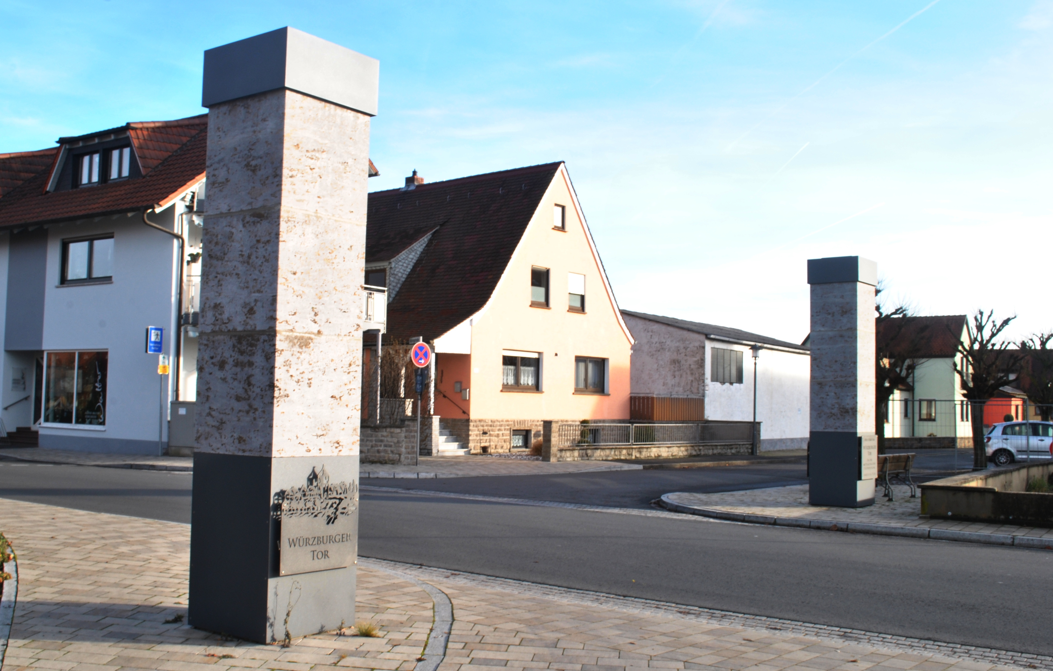 Hinweissäulen auf das ehemalige Würzburger Tor in der Stadtschwarzacher Ortsbefestigung, das im 19. Jahrhundert entfernt wurde